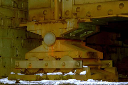 Mehrrollenlager Eisenbahnbrücke über die Spree in Cottbus nahe Branitz / Ort: Cottbus